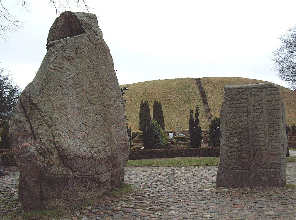 Zu sehen sind der größere und der kleinere Runenstein von Jellig vor dem Grabhügel